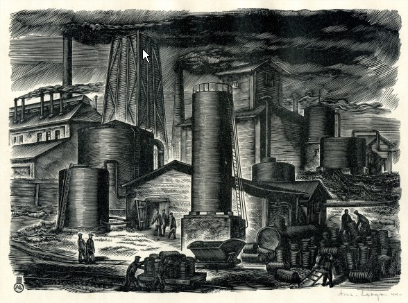 Arkadio Laigo, „Vaade õlitööstuse õuele”, 1944. Puugravüüride mapist „Põlevkivitööstus”